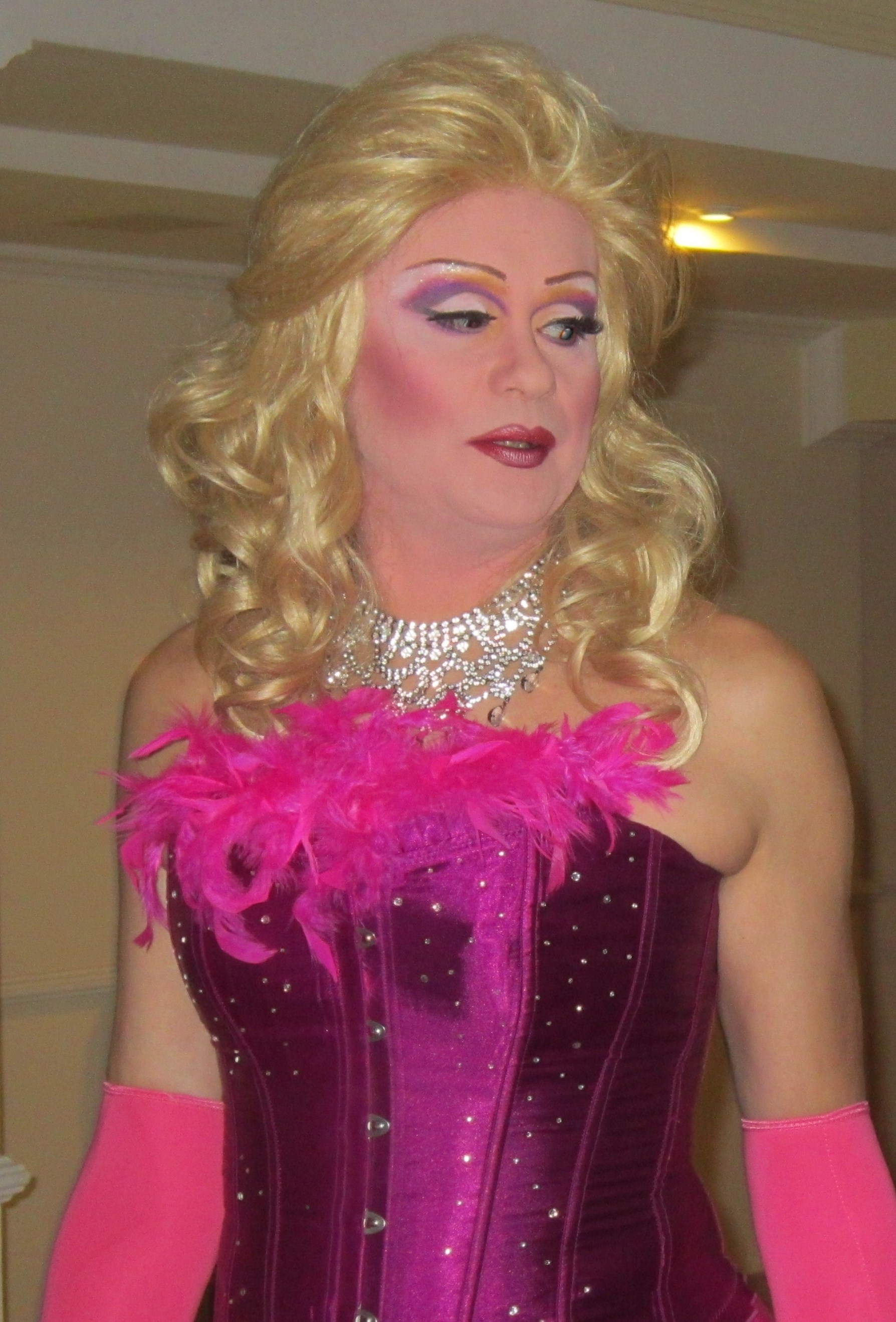 Drag queen Gabrielle. Showman drag queen de Madrid.